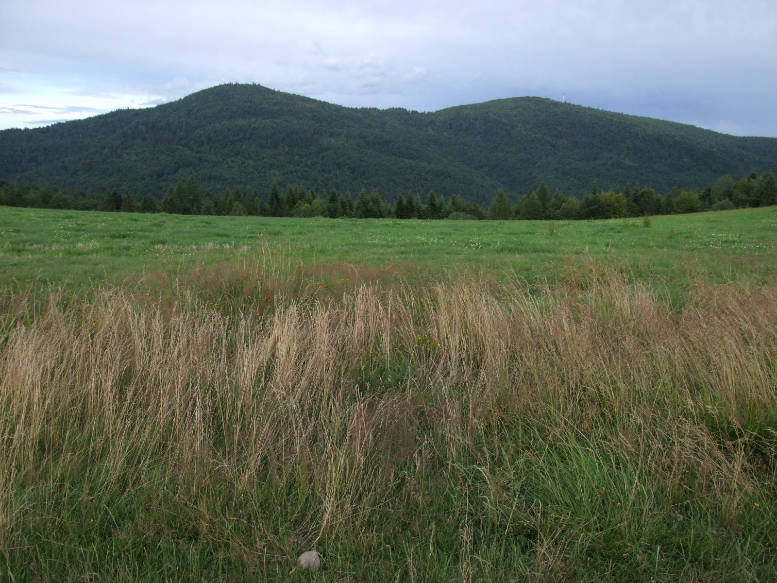 Wielki Wierch i Kiczora Kamienicka. Widok ze zboczy Myszycy